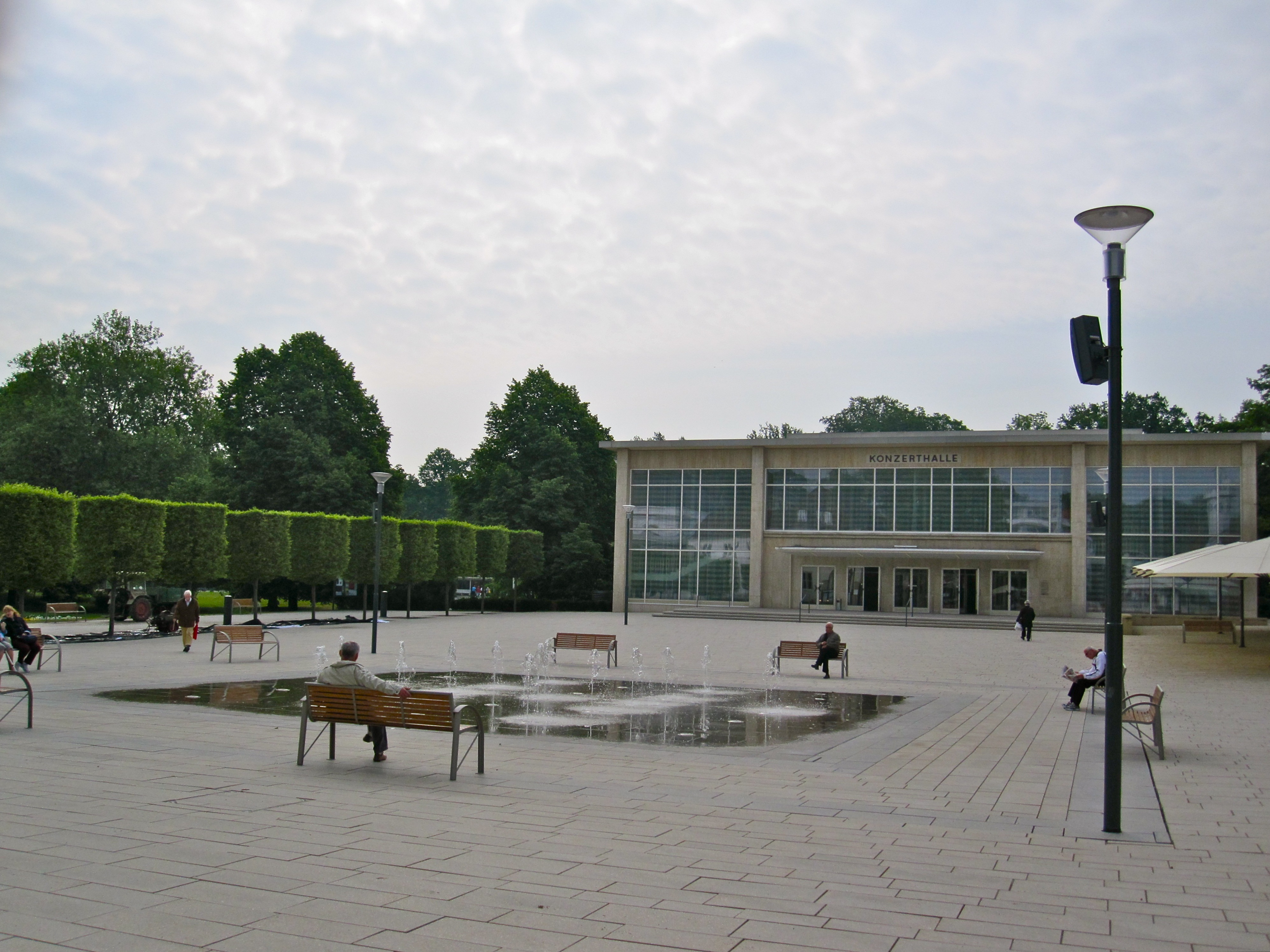 Konzerthalle im Kurpark Bad Salzuflen mit neuem Brunnen und neugestaltetem Vorplatz